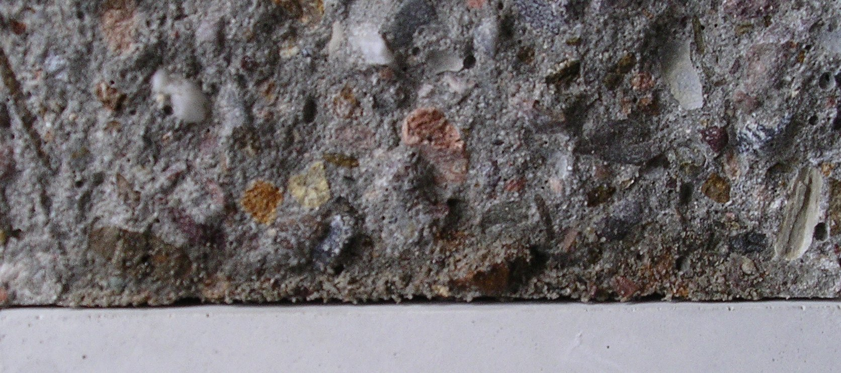 Beton der Güte C35/34, Prüfkörper: Würfel mit 150mm Kantenlänge. Gespalten nach Prüfung der Wassereindringtiefe. Eindringtiefe ca. 14mm.